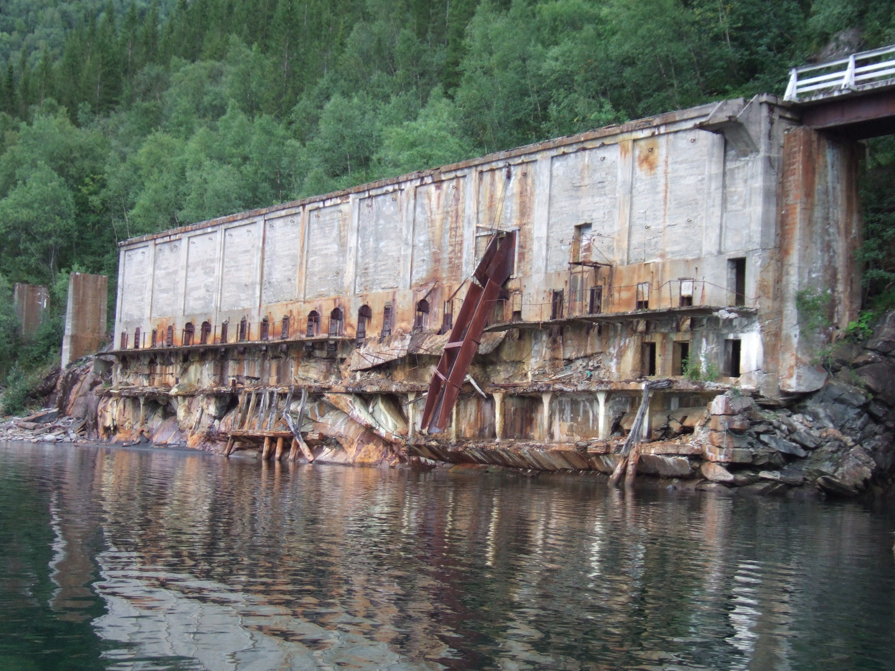 Forlengst nedlagt silo og lasteterminal for kobber på Sjønstå ved Øvervatnet i Fauske kommune i Nordland. Siloen tilhørte Sulitjelma Gruber.